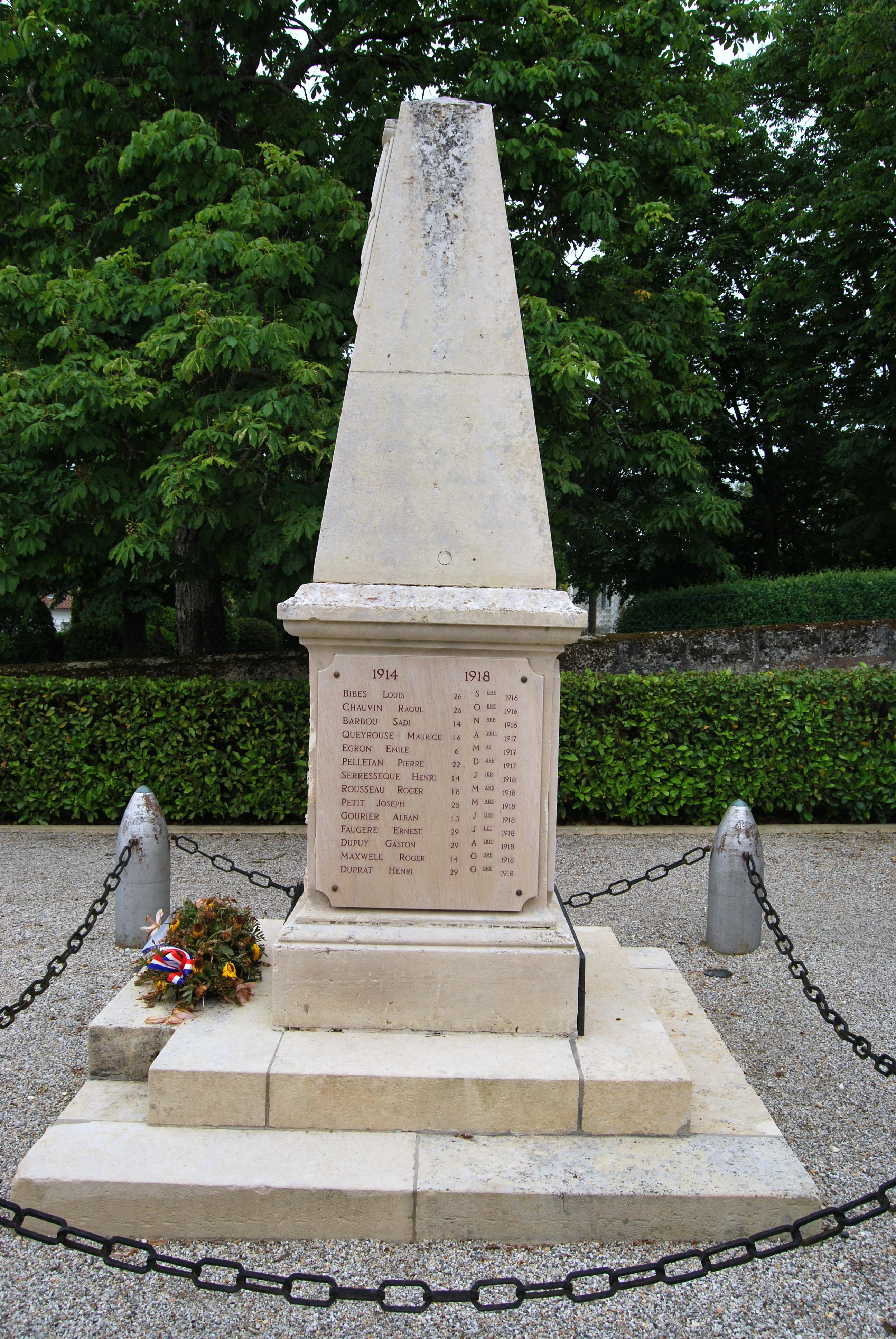 Yvrac Mont aux mort